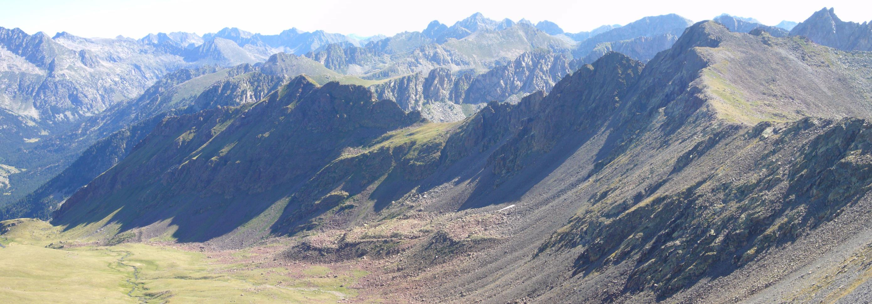 Bony del Graller, Crestells del Montanyó i Pic Roi, vistos des del Tuc dels Carants; la Vall de Boí, Alta Ribagorça, Catalunya